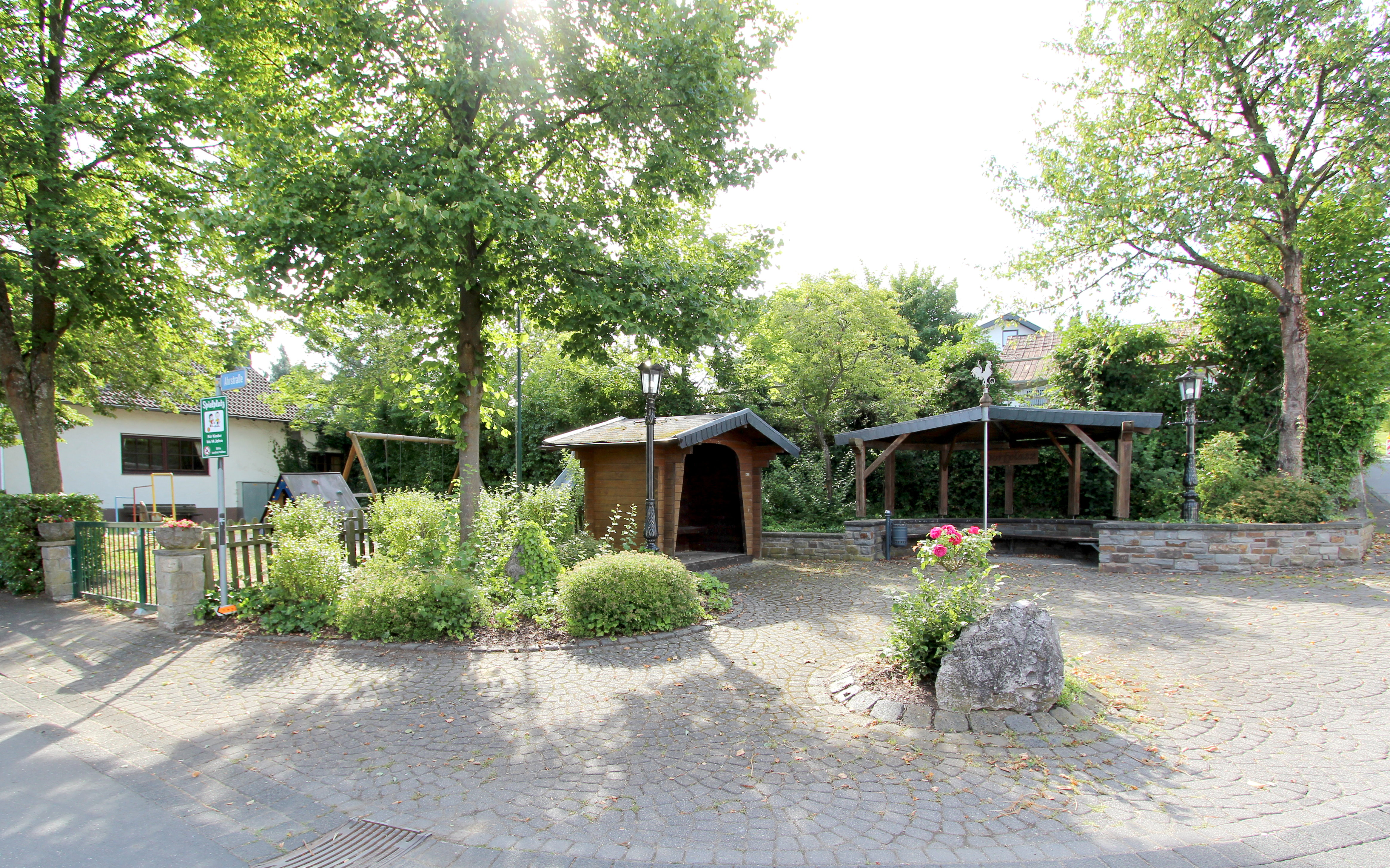 Sierscheid, Ecke Harscheider Straße/Ahrstraße. Aufnahme von 2017.